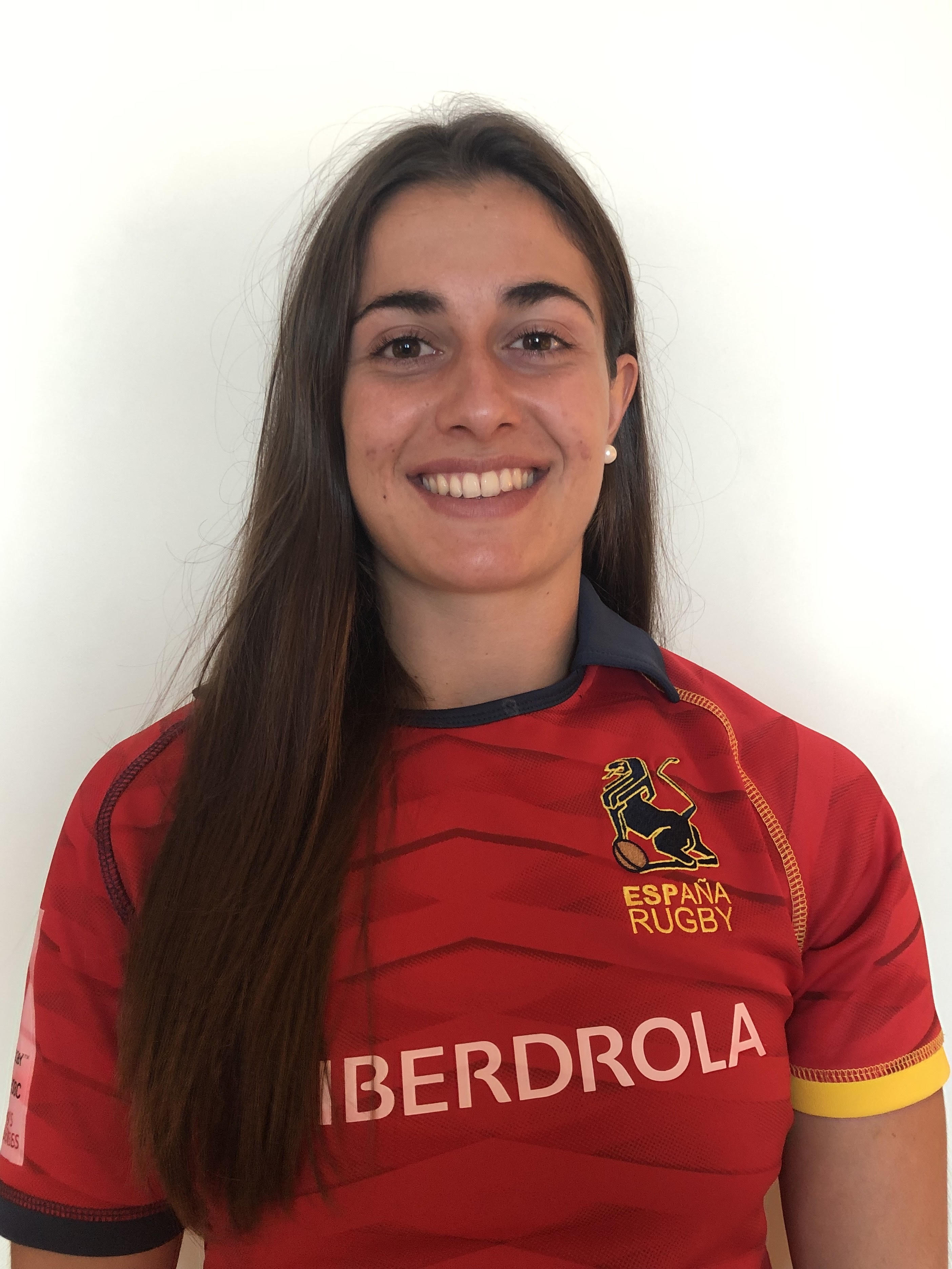 Gasteizko errugbi jokalaria